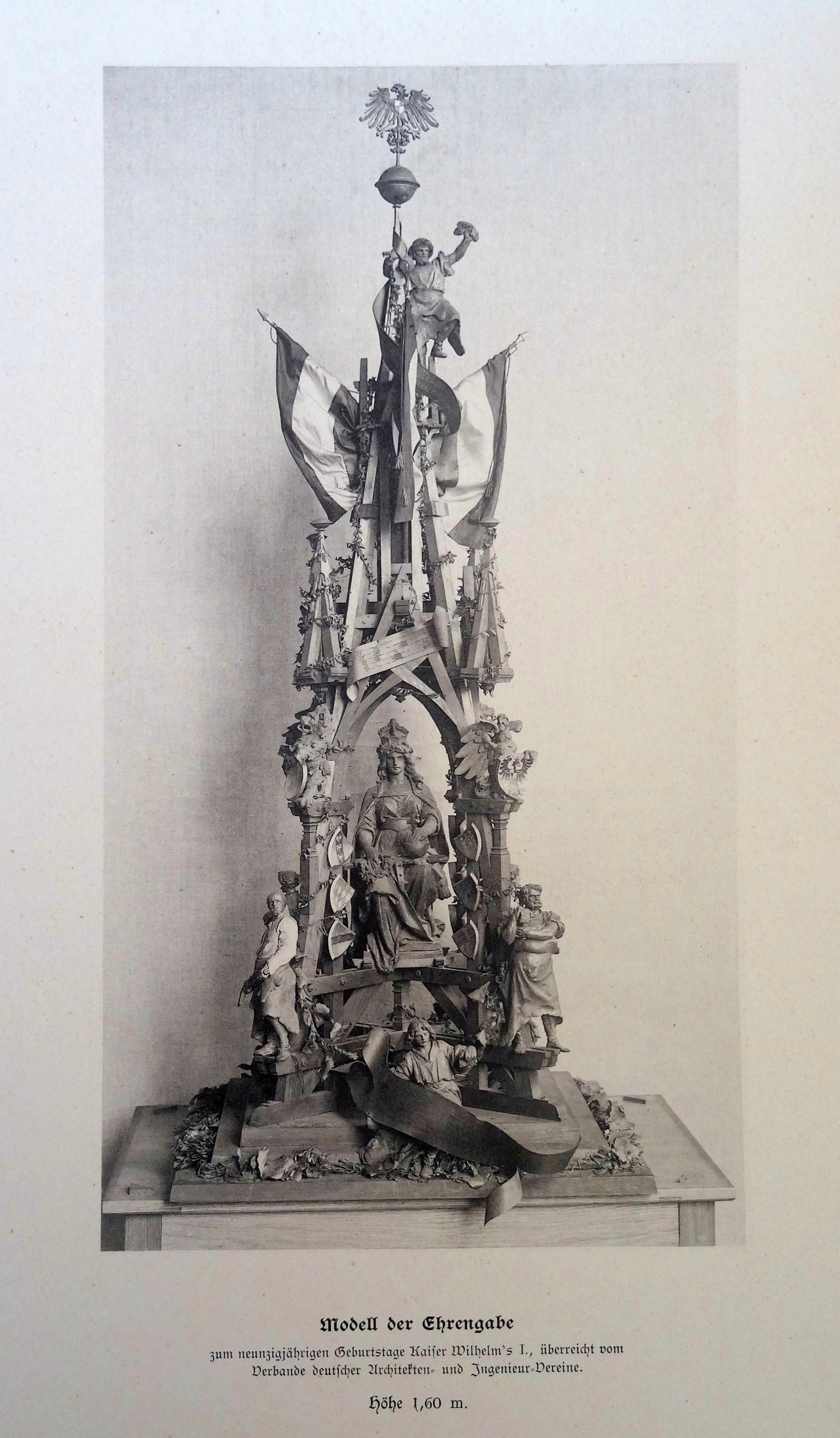 1887 - vom Bildhauer Aloys Denoth: Modell der Ehrengabe zum 90. Geburtstags von Kaiser Wilhelms I. überreicht vom Vergand deutscher Architekten- und Ingeniervereine